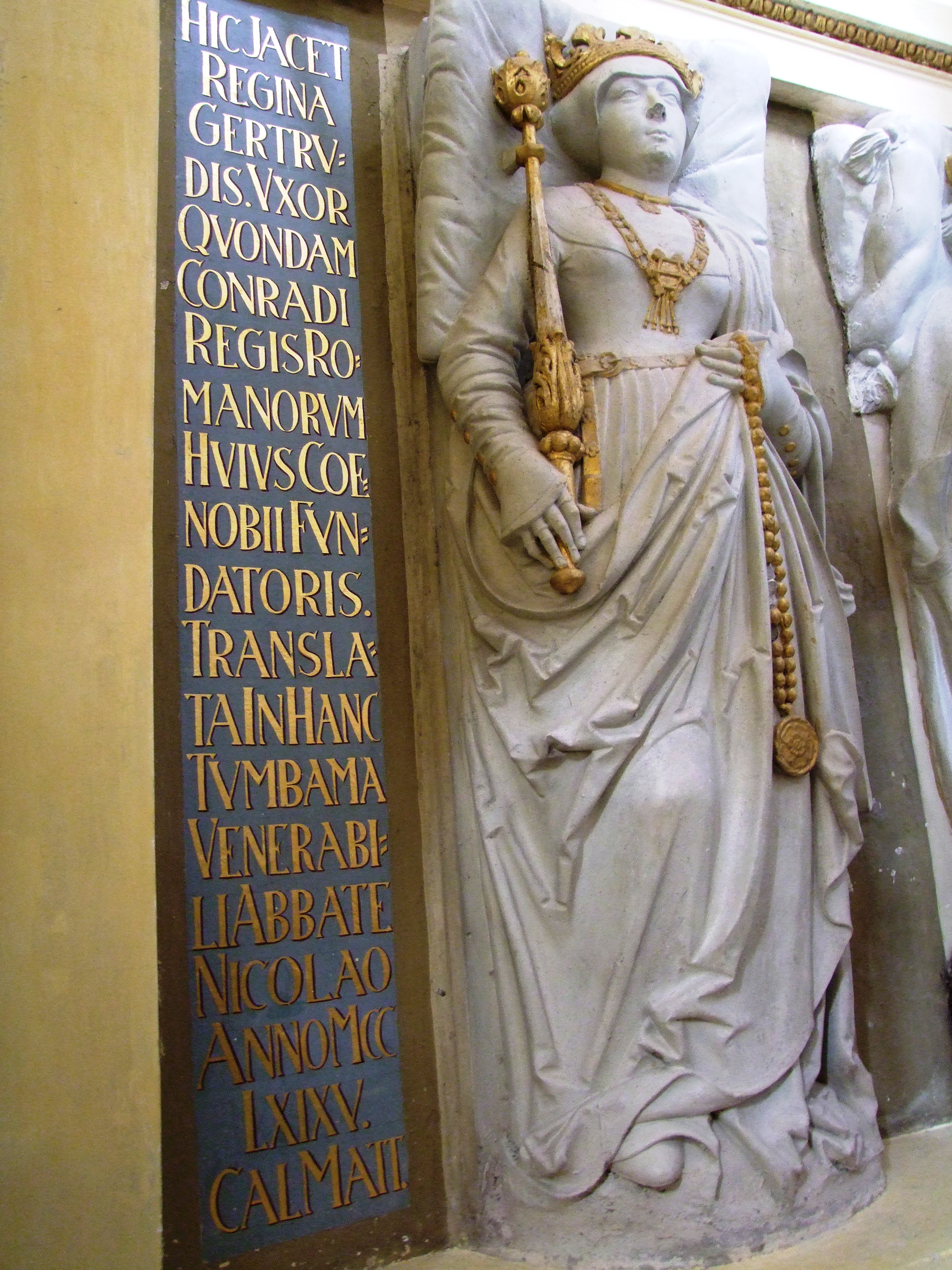 Die Abteikirche der ehemaligen Zisterzienserabtei in Ebrach.